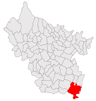 Categorie:Hărţi ale judeţului Buzău